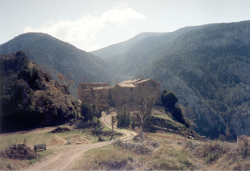 Fotografia de la darreria del segle XX de Cal Valenti a la vall de la Vansa (Alt Urgell).